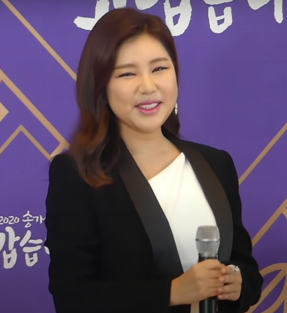 1월 16일 오후 서울시 마포구 상암동 MBC에서 설특집 2020 송가인 콘서트 ‘고맙습니다’ 공개 녹화에 앞서 포토타임을 갖고 있다.